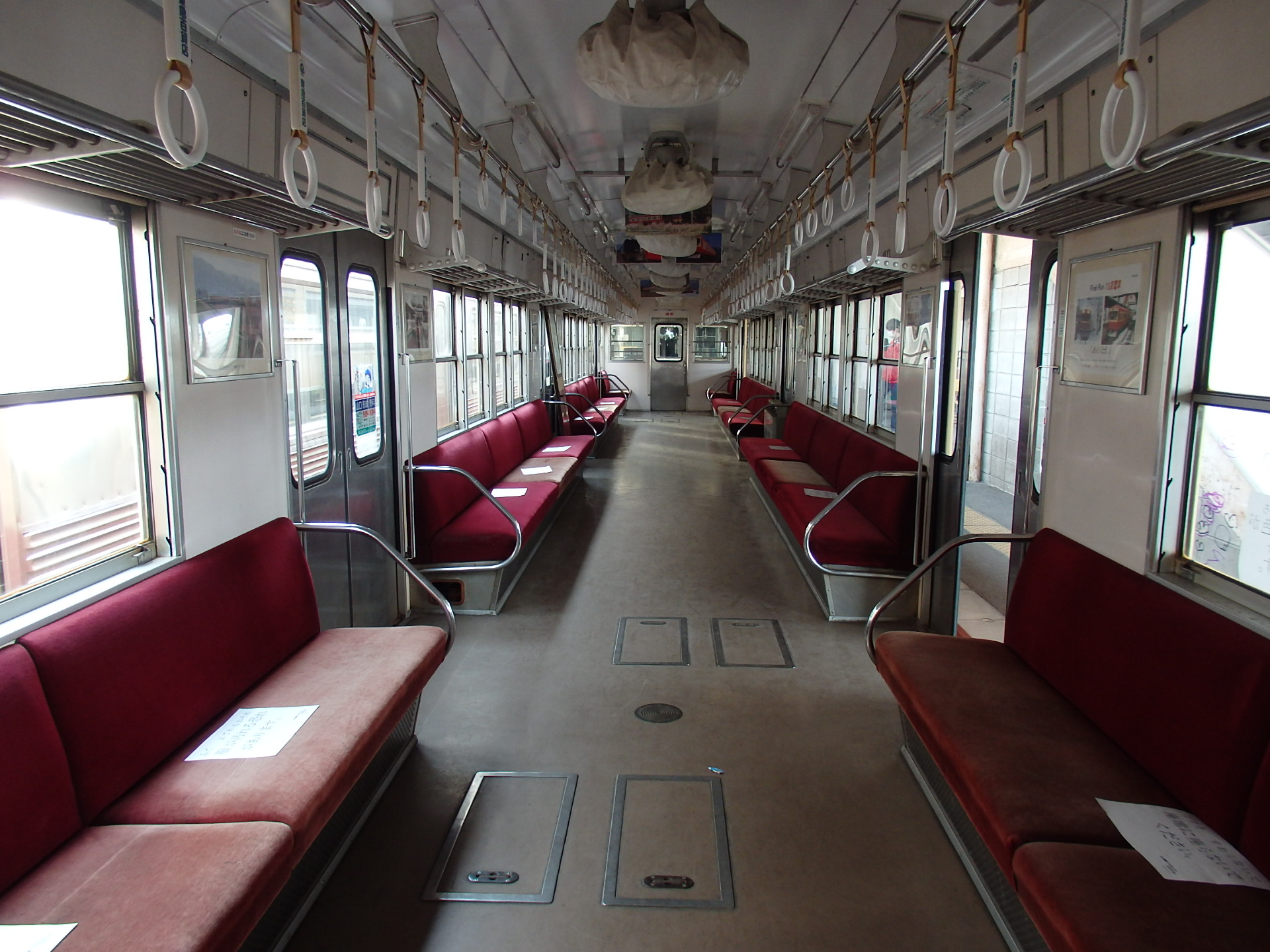 長野電鉄OS11形（モハ11形）の車内（「S11編成＆ED5001形 お別れ会」にて撮影）。